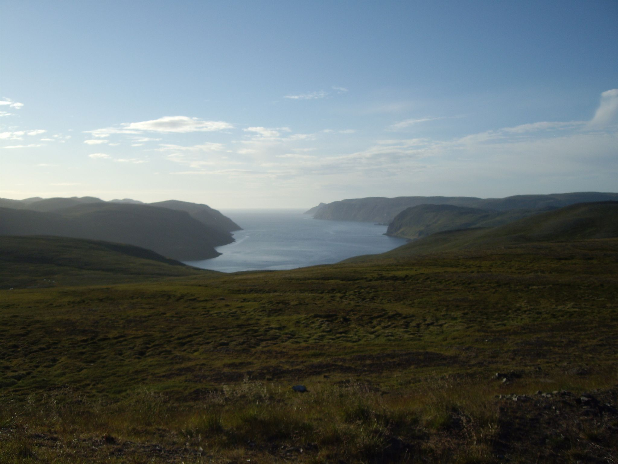 Tufjorden i Nordkapp kommune, Finnmark.